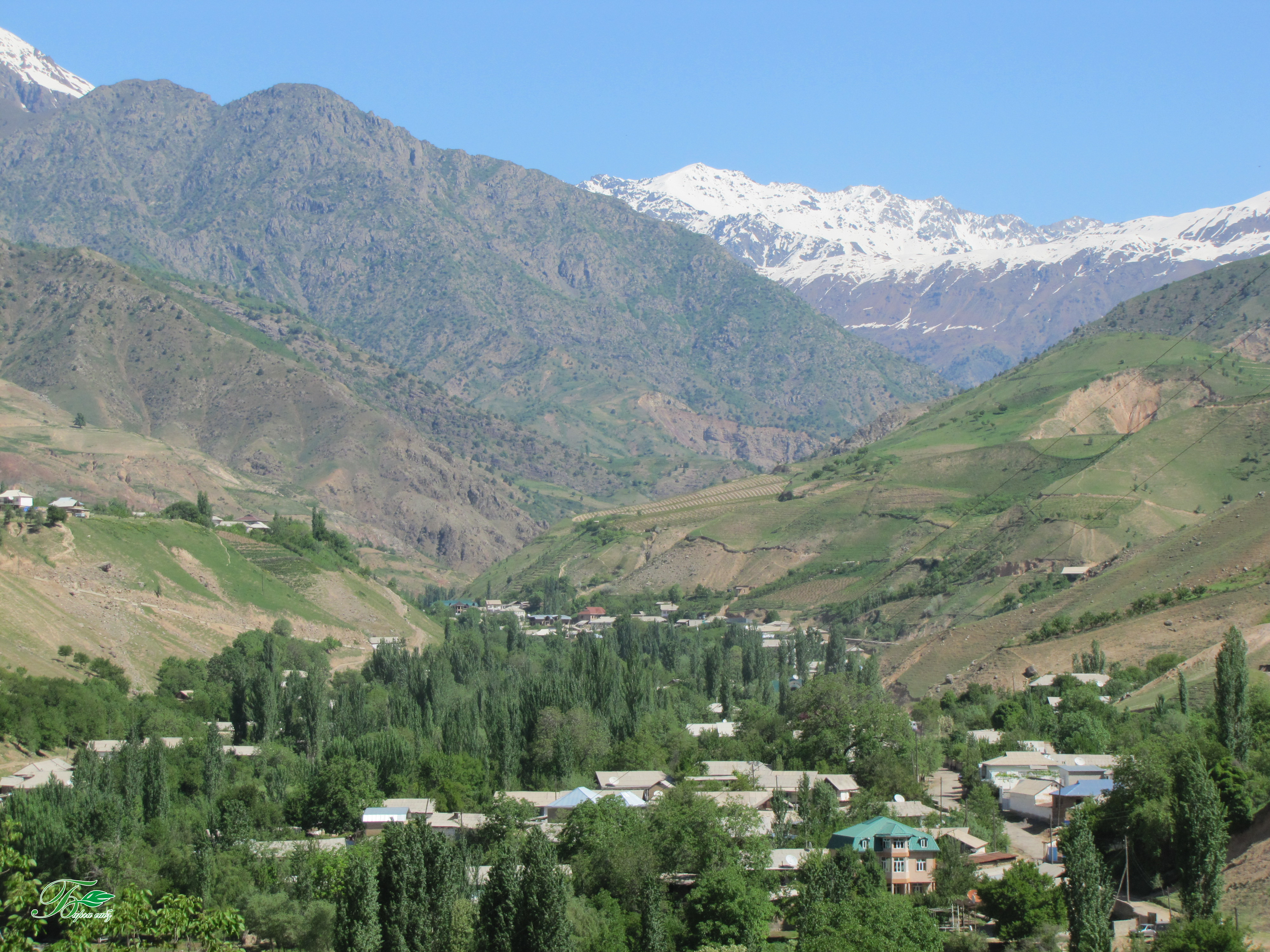 Тоҷикӣ: Тобистони деҳа